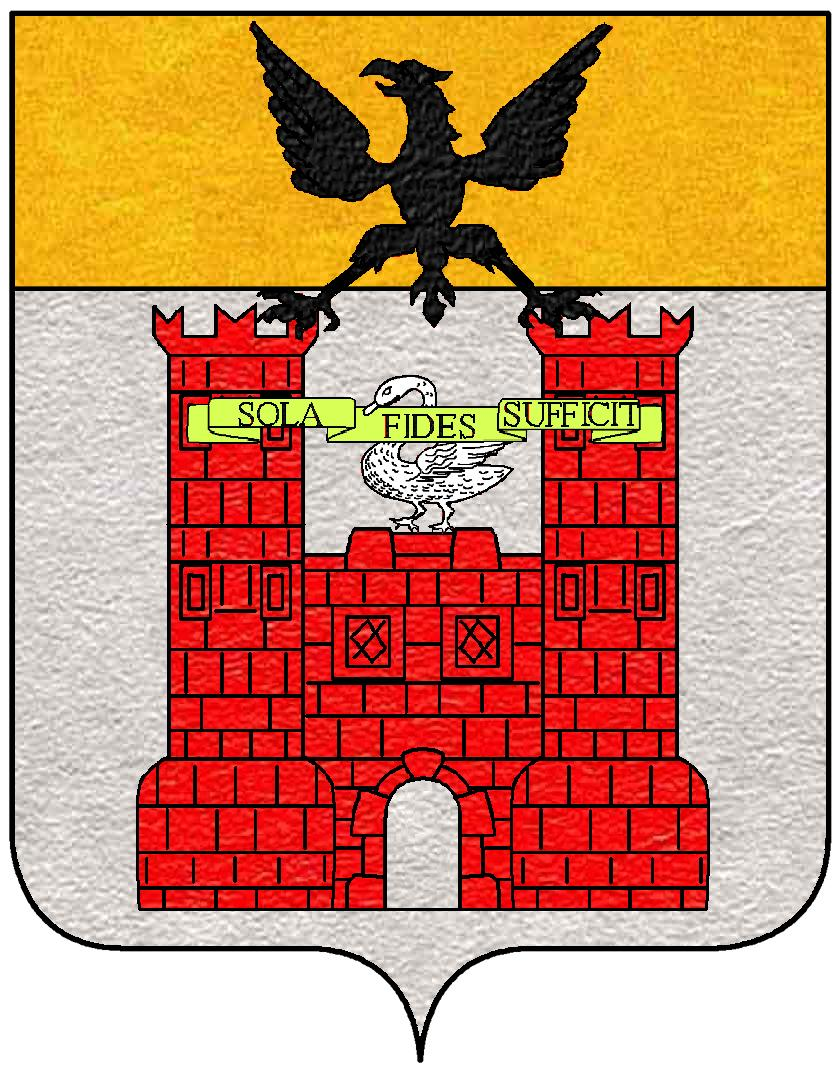 Stemma della famiglia Sessa